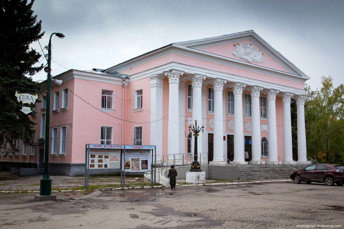 Дом культуры "Чайка". Посёлок Управленческий, Красноглинский район Самары, Россия.